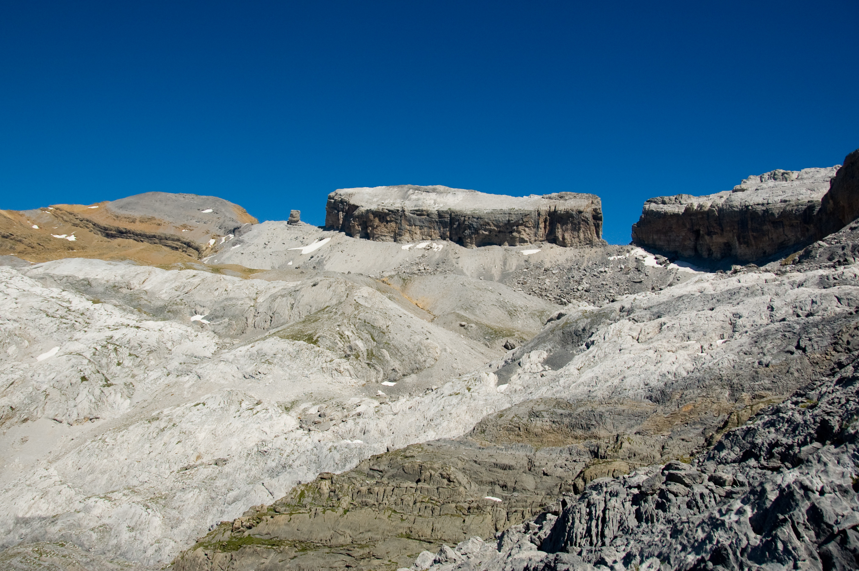 De gauche (ouest) à droite (est) : pic du Taillon, fausse Brèche, pic Bazillac, brèche de Roland. Vue prise versant espagnol. This photograph was taken with a Nikon D70.